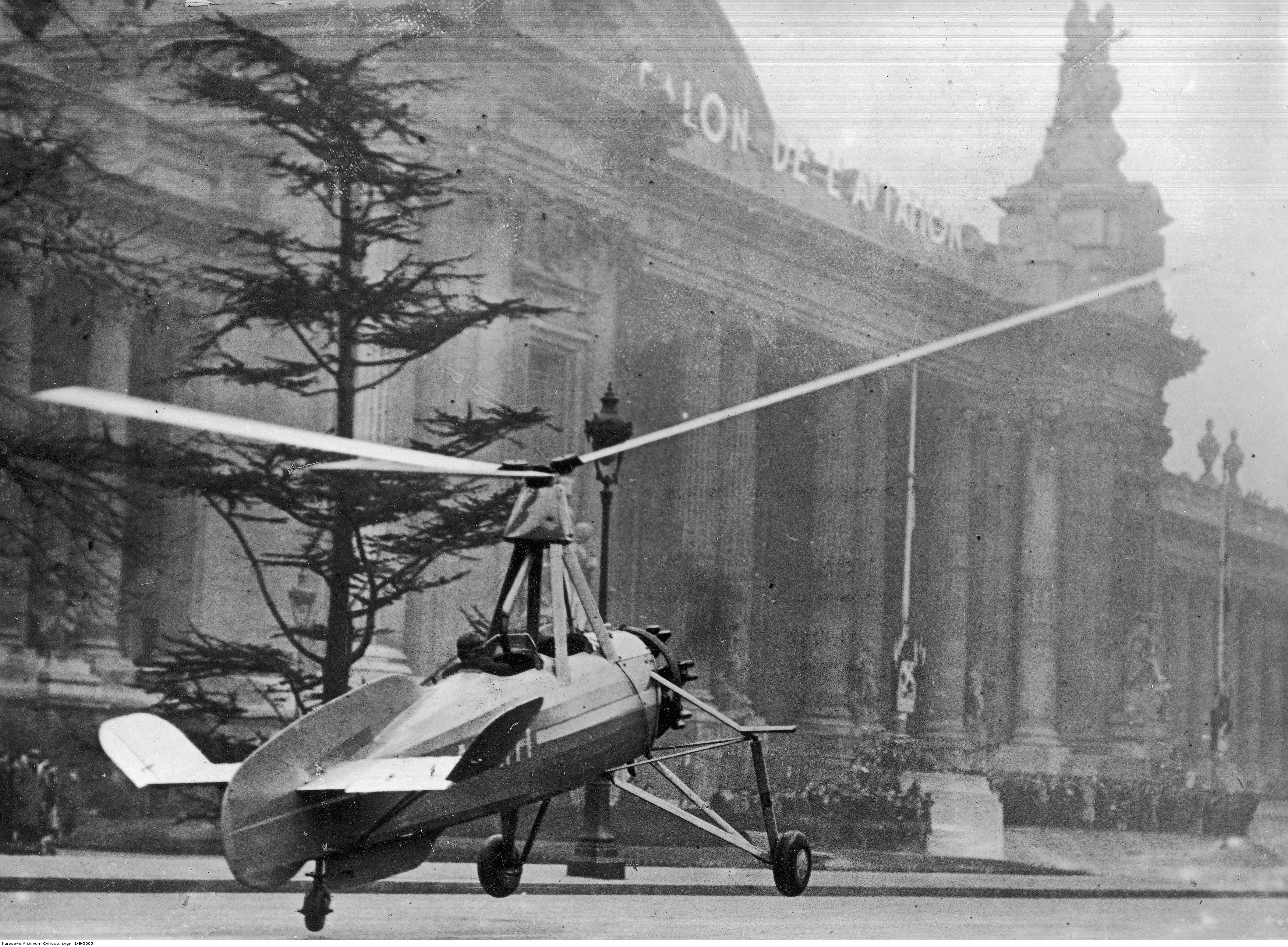 Wiatrakowiec skonstruowany przez Juana de la Cierva eksponowany podczas Międzynarodowego Salonu Lotniczego w Paryżu.